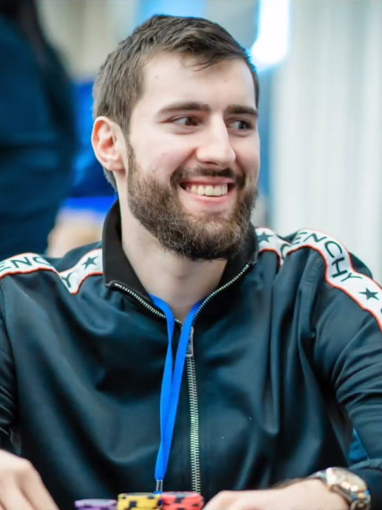 Wiktor Malinowski bei der partypoker Live Millions Super High Roller Series in Sotschi